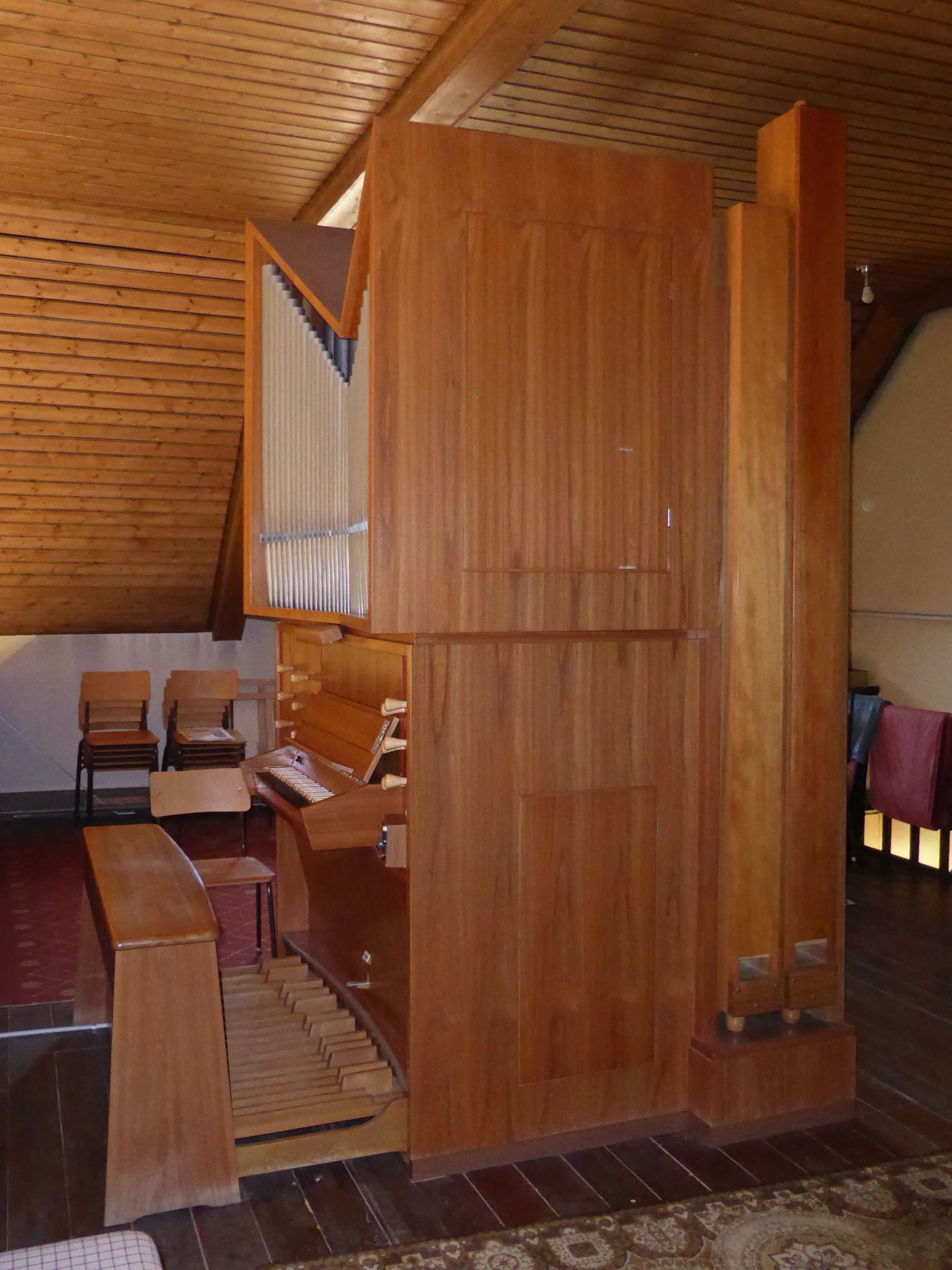 Krell-Orgel in der katholischen St.-Joseph-Kirche in Wolsdorf, Landkreis Helmstedt.